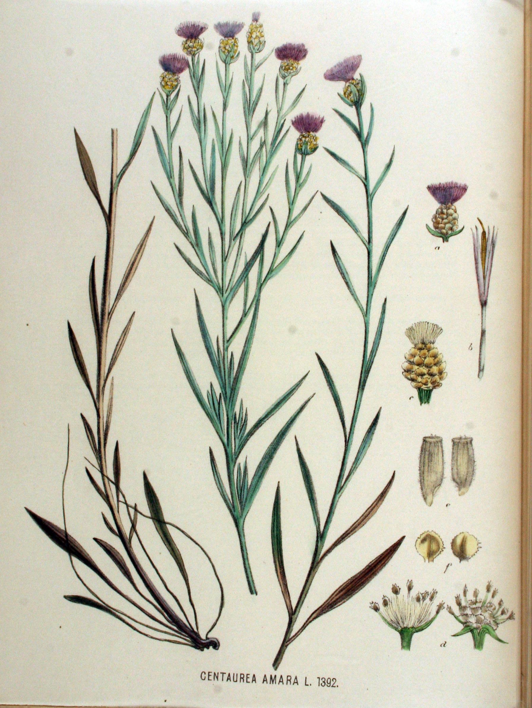 Centaurea jacea L. subsp. timbalii (Martrin-Donos) Br.-Bl. (Syn. Centaurea amara auct non L.)